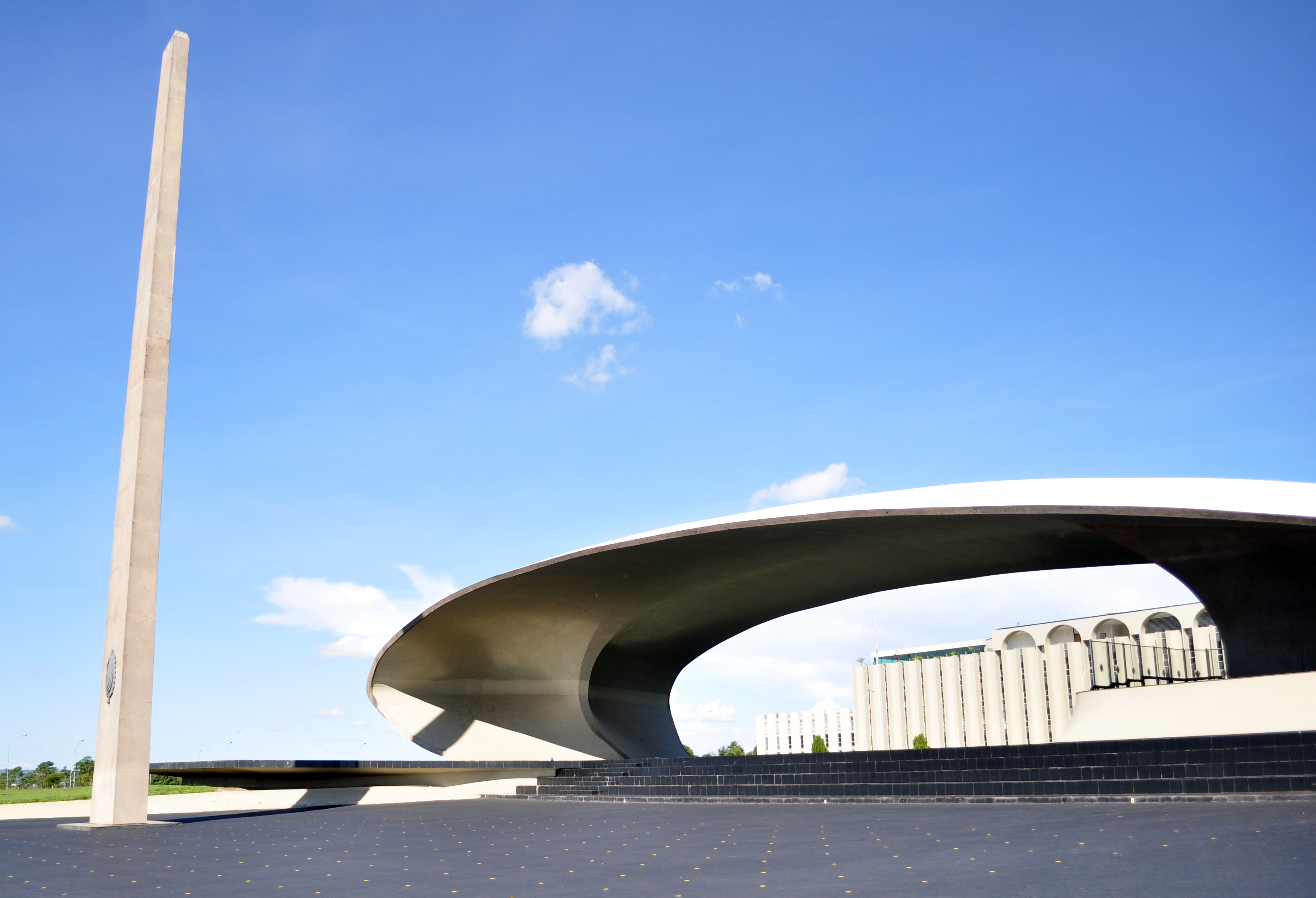 Quartel General do Exército, Brasília, Brasil - 2010